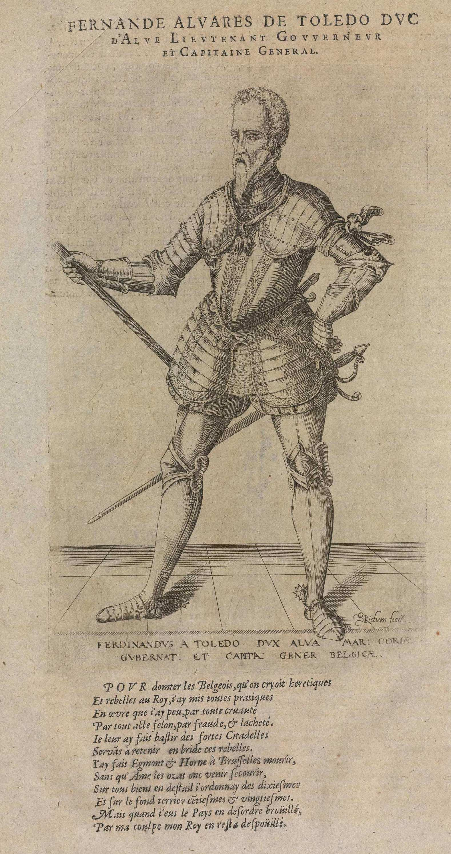 Christoffel van Sichem: Fernando Alvares de Toledo duc d'Alve, Lieutenant, Govverneur et Capitaine general. Ilustración de "La grande chronique ancienne et moderne de Holande..." de Jean-François Le Petit impresa en Dordrecht en dos tomos, el primero a cargo de Jacob Canin y el segundo por Guillaume Guillemot, 1601